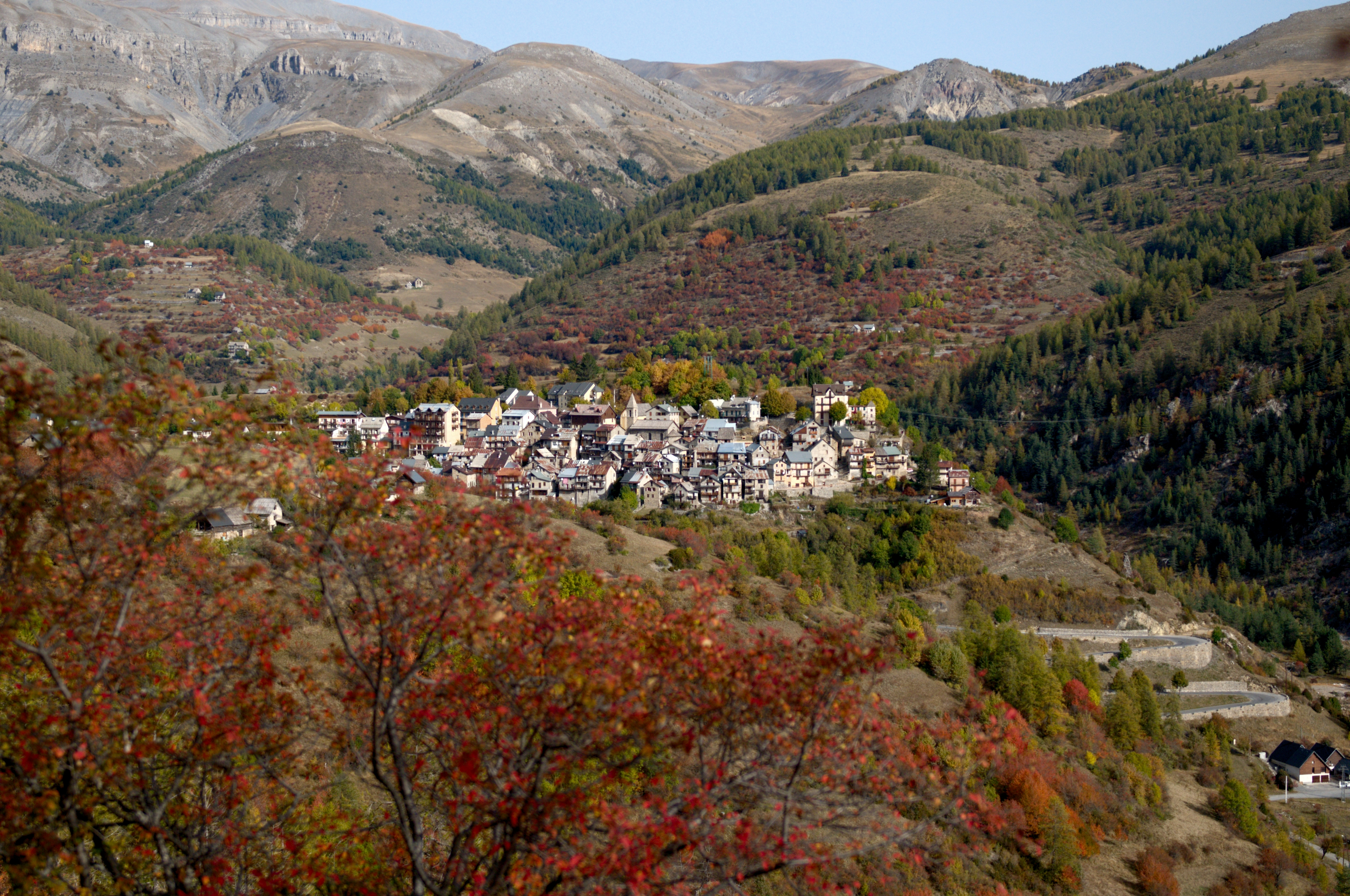 Beuil